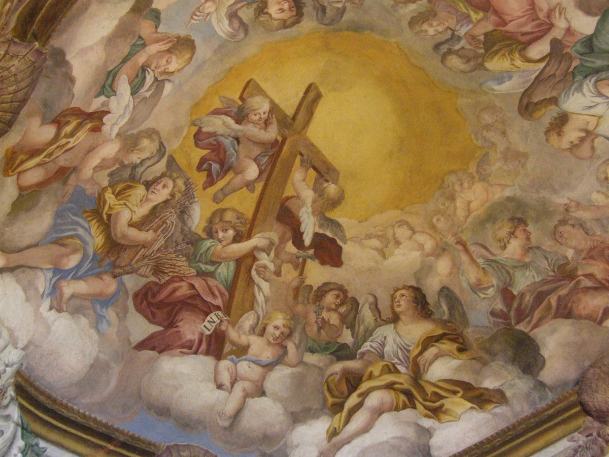 Sacro Monte di Varallo, Varallo Sesia, Italy; Frescoes of chapel XLIII